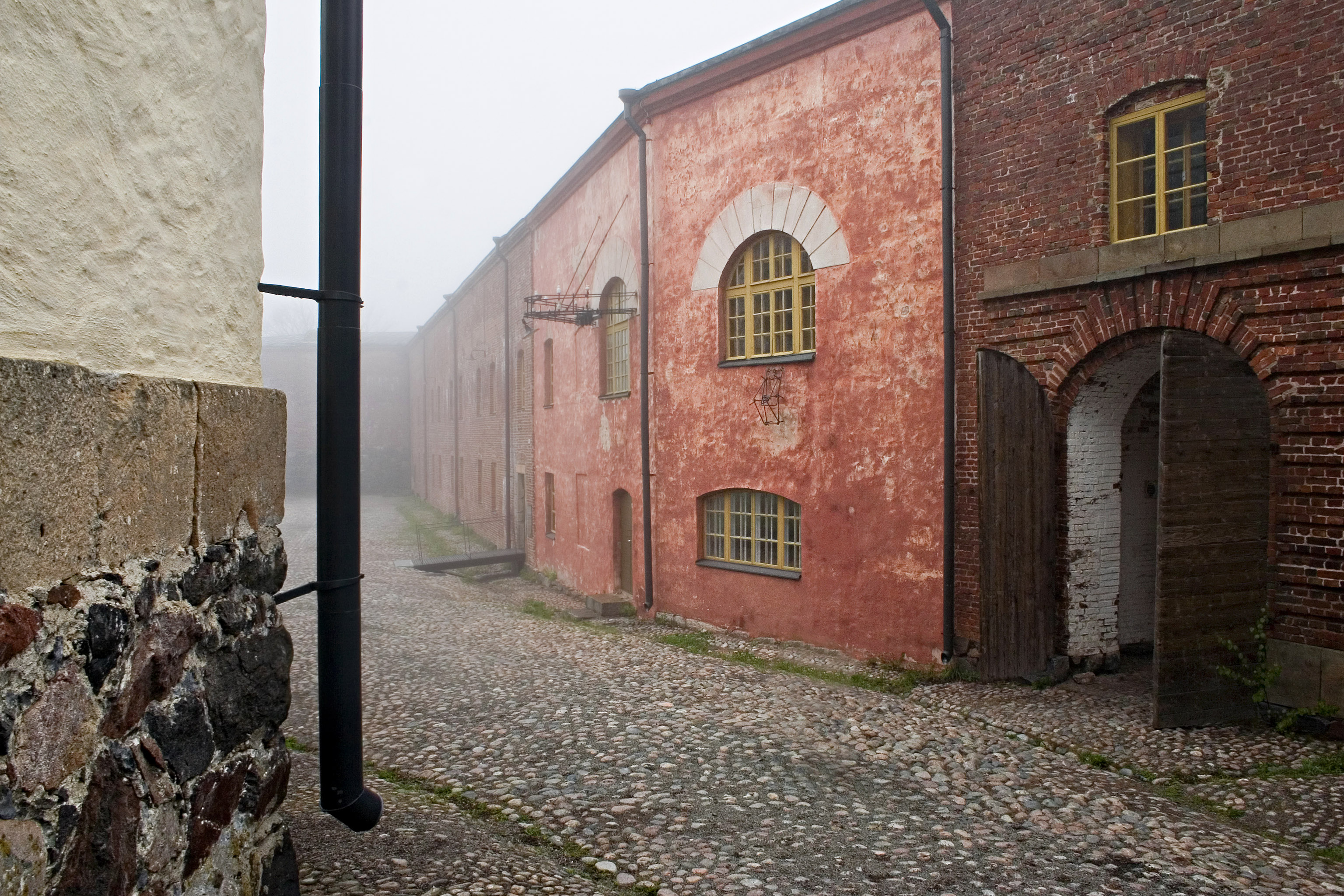 Arkkitehtuuria Suomenlinnan Susisaaressa